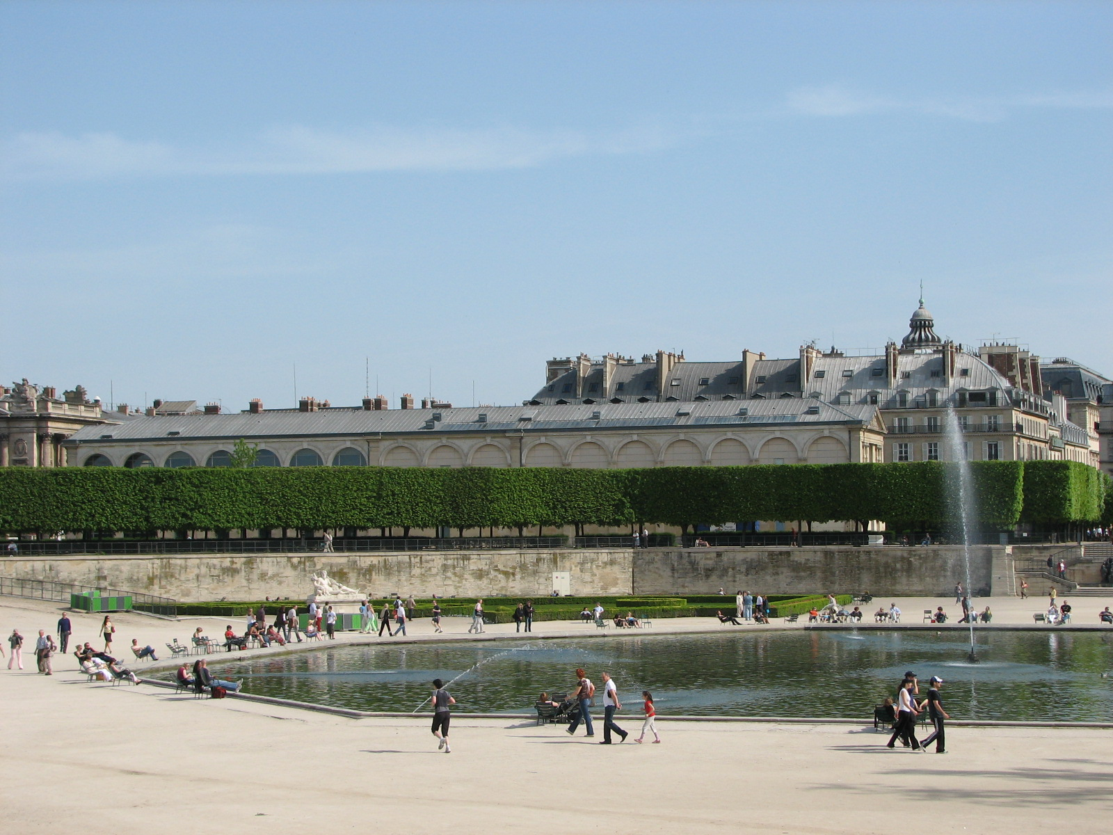 Le bâtiment de la galerie nationale du Jeu de Paume (derrière les arbres) dans le Jardin des Tuileries à Paris.